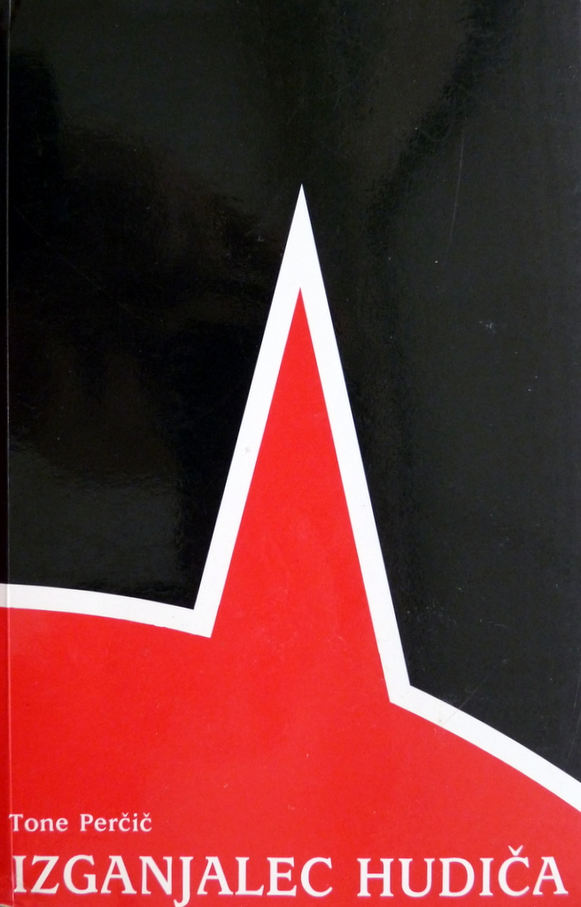 Naslovnica romana Toneta Perčiča Izganjalec hudiča